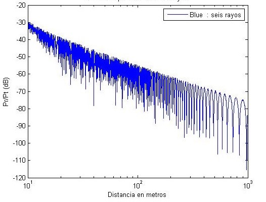 modelamiento de las perdidas por trayectoria de espacio linbre en el modelo de 6 rayos cuando la distacia de la pared y las alturas son distintas.